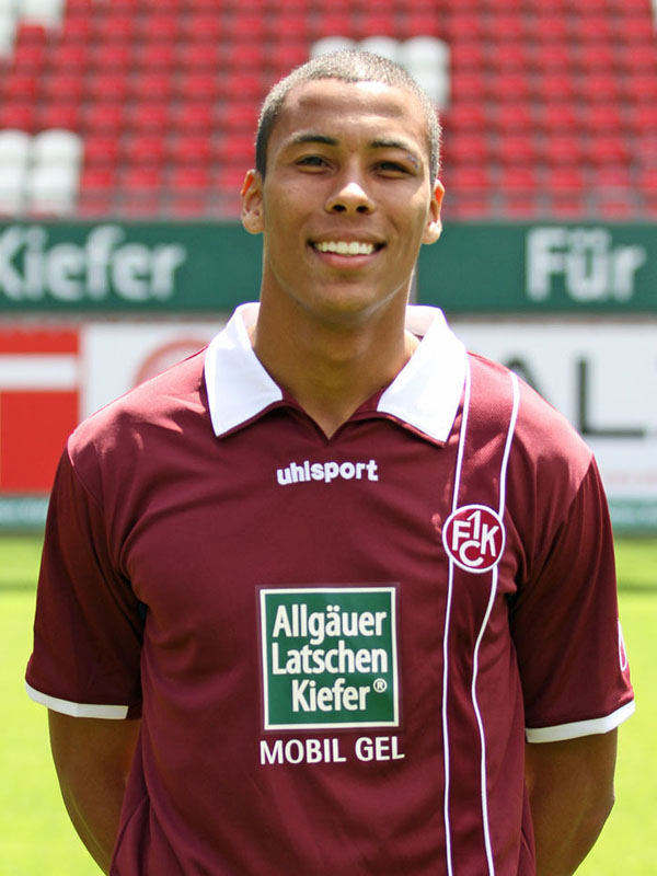 Lucas dos Santos Rocha da Silva, Fußballspieler